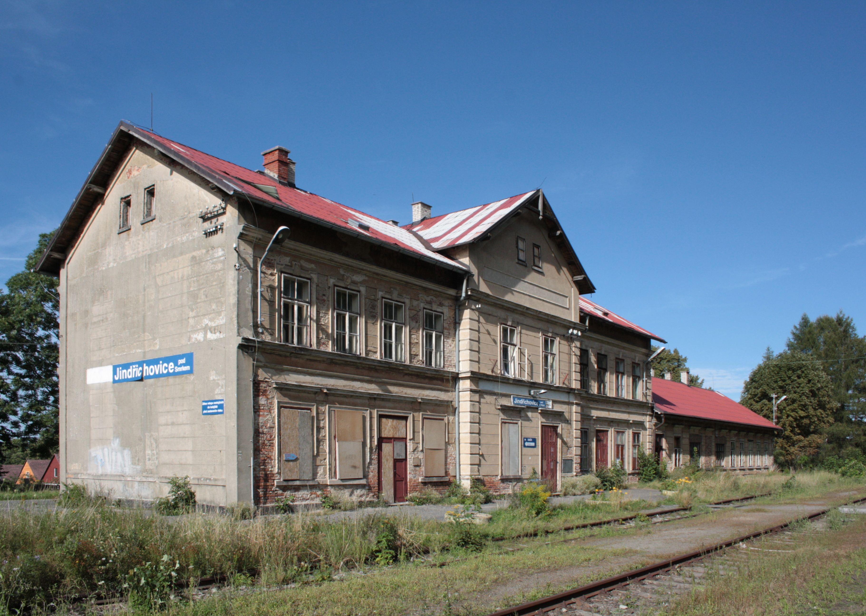 Staniční budova na železniční zastávce v Jindřichovicích pod Smrkem (pohled z jihozápadu).